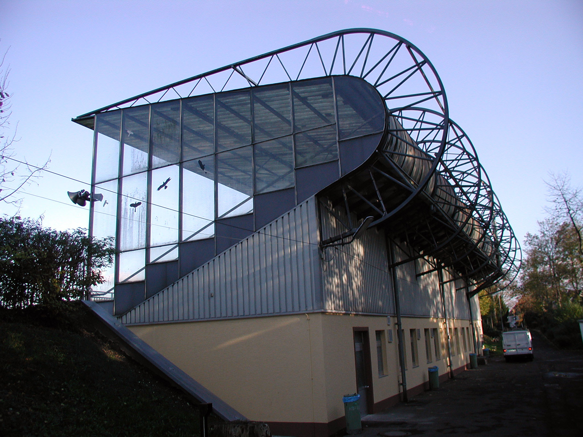 Hürth-Alt-Hürth, Stadiontribüne